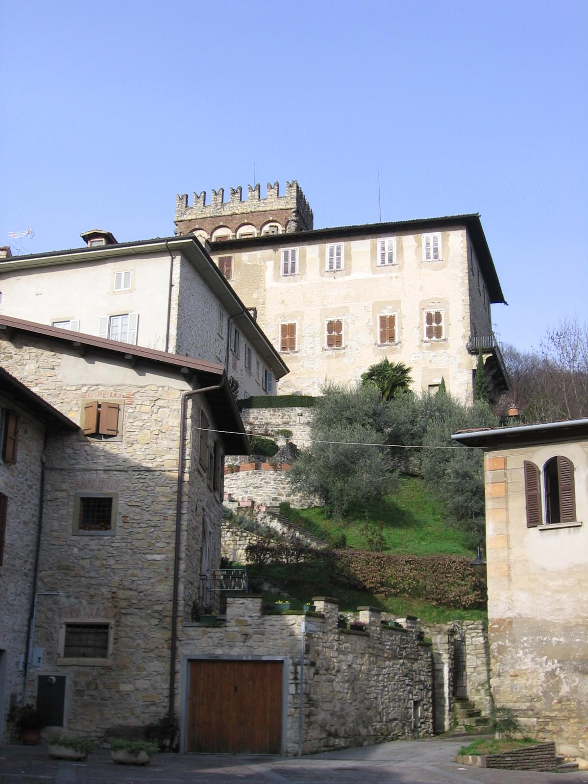 Costa di Mezzate, Bergamo, Italia